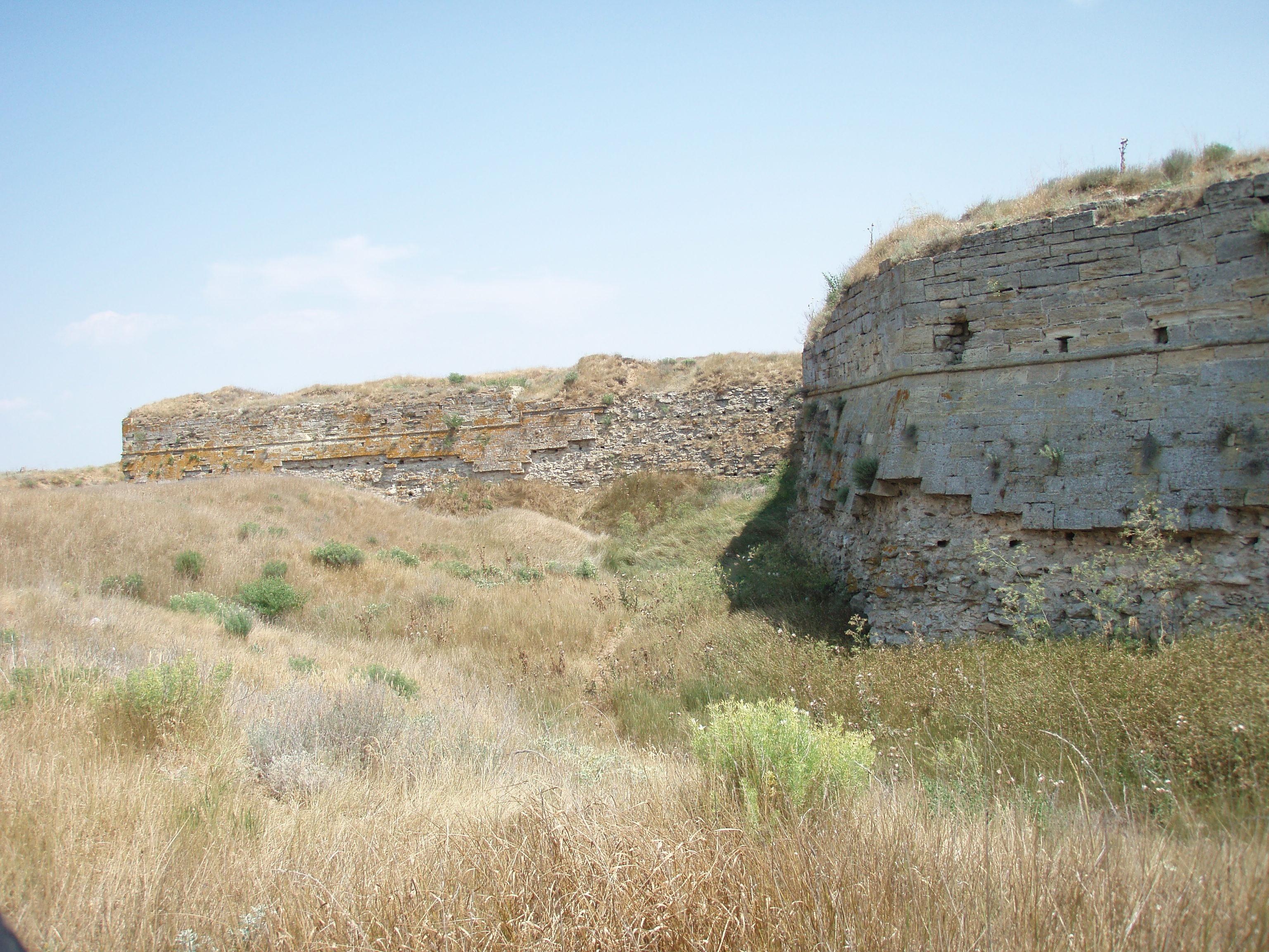 Арабатська фортеця. Залишки фортеці з південного заходу.